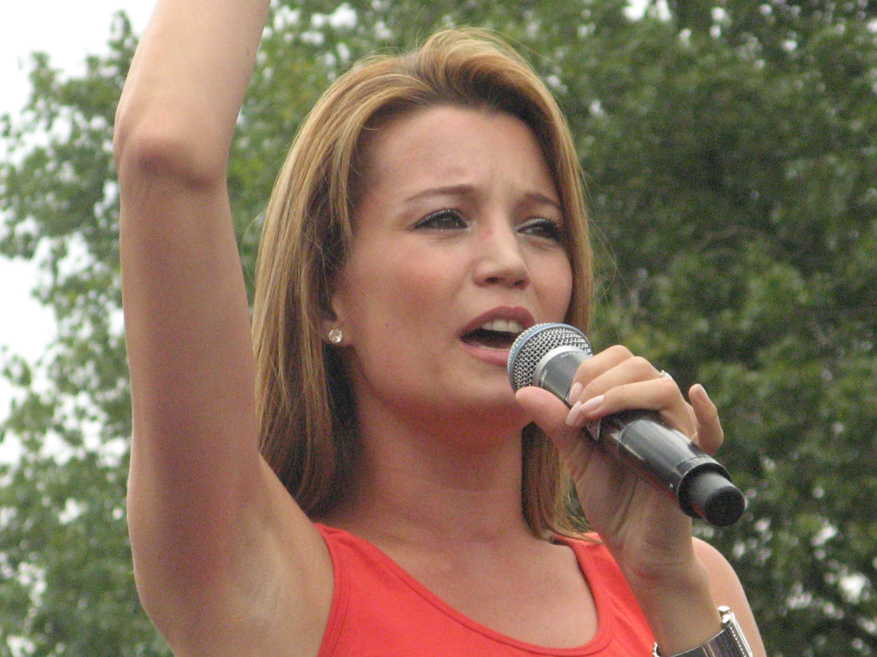 Nádine (28 februari 1982) is een populaire Zuid-Afrikaanse zangeres, een tevens een van de beroemdste in het land. -- Getrokken bij Hit The Road te Tielt